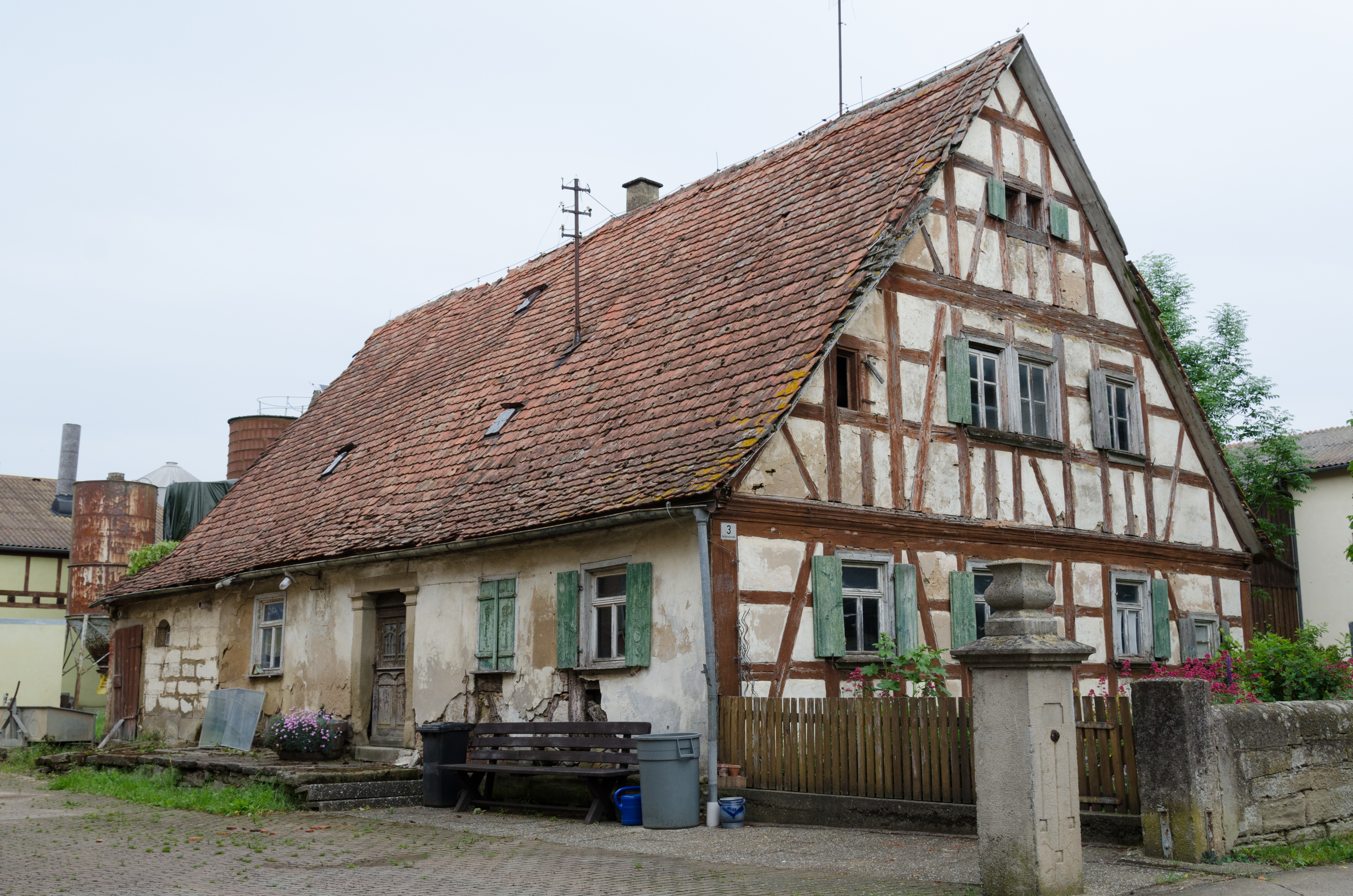 Burgbernheim, Buchheim, Raiffeisenstraße 3